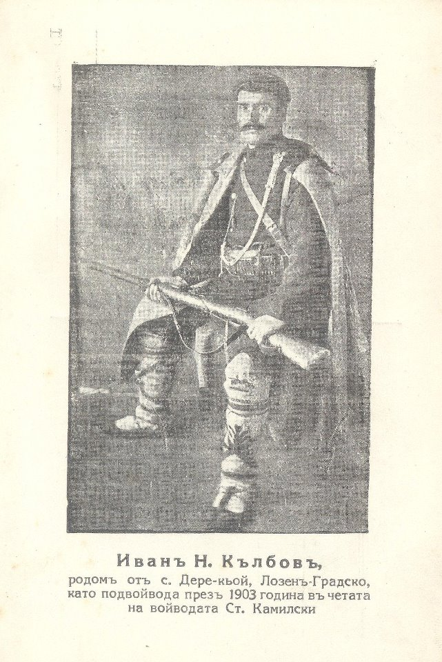 Иван Н. Кълбов